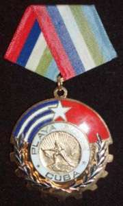 Национальный орден Плайя-Хирон 1971г. Категория:Изображения:Награды